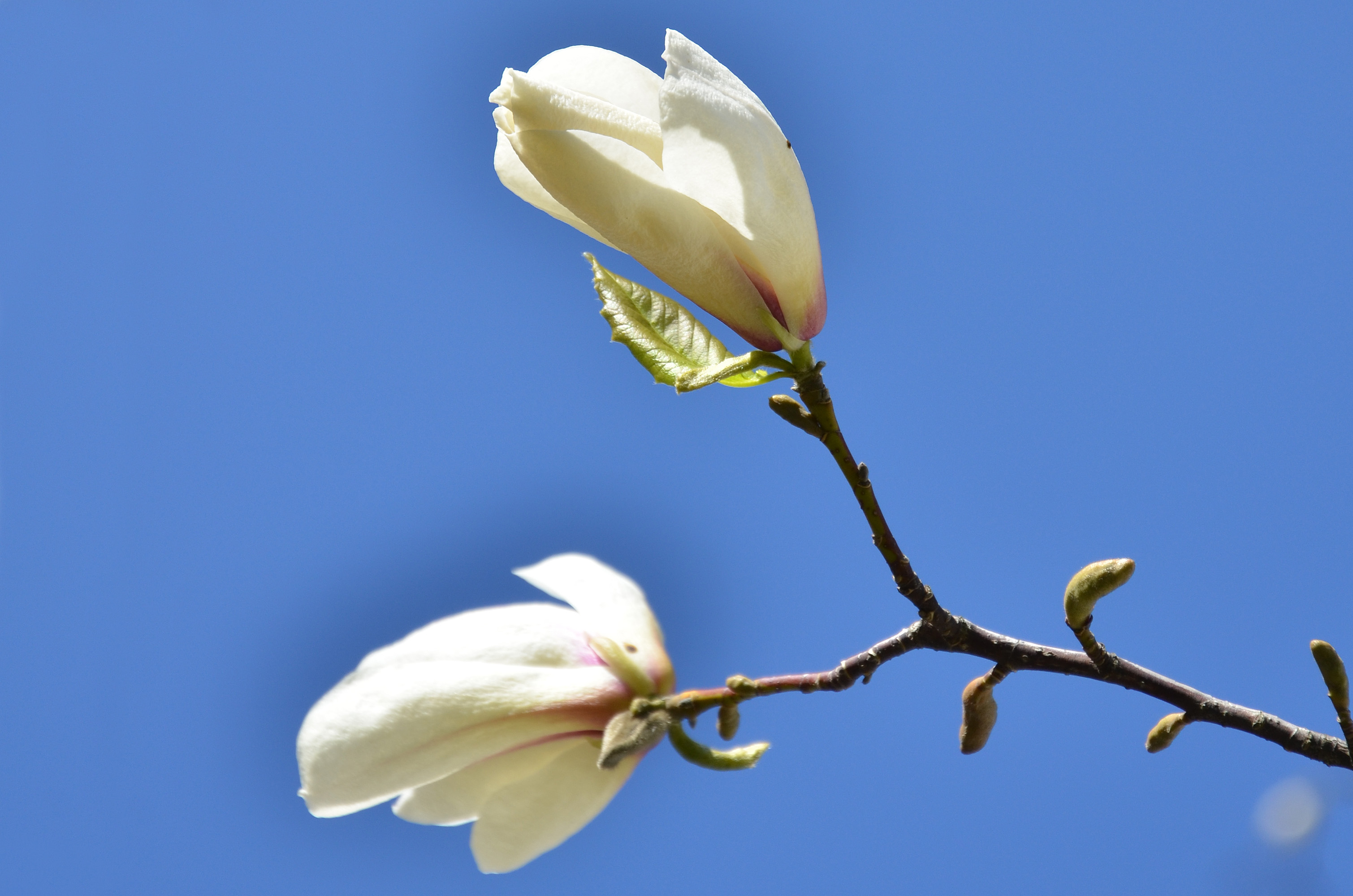 Весняний цвіт «Тернопільських магнолій».